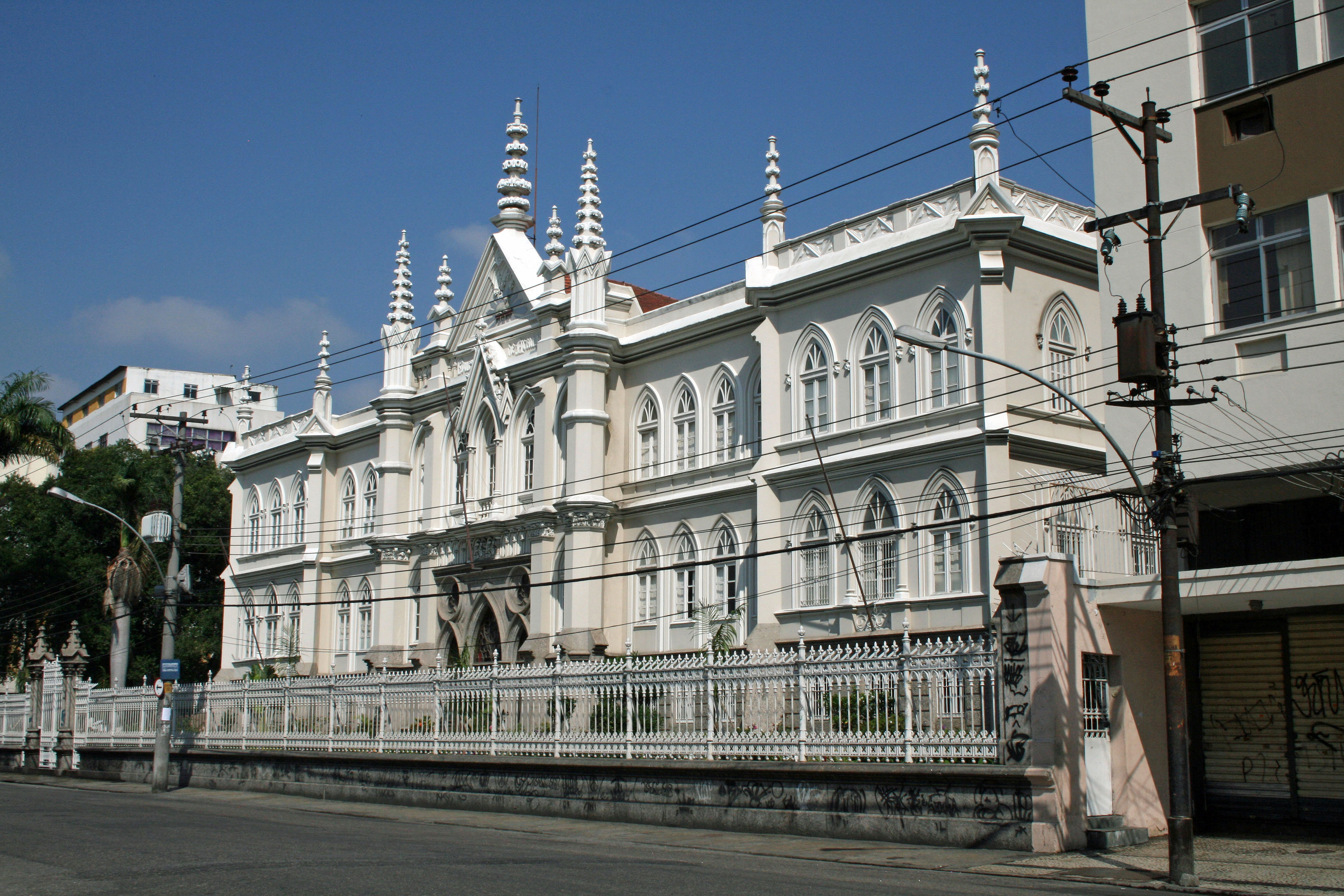 Inaugurado em 30 de dezembro de 1900, pelo Presidente Campos Salles e abençoado pelo então Arcebispo do Rio, Dom Joaquim do Arcoverde, o Educandário é uma das mais belas dentre as obras sociais mantidas pela Irmandade da Candelária.